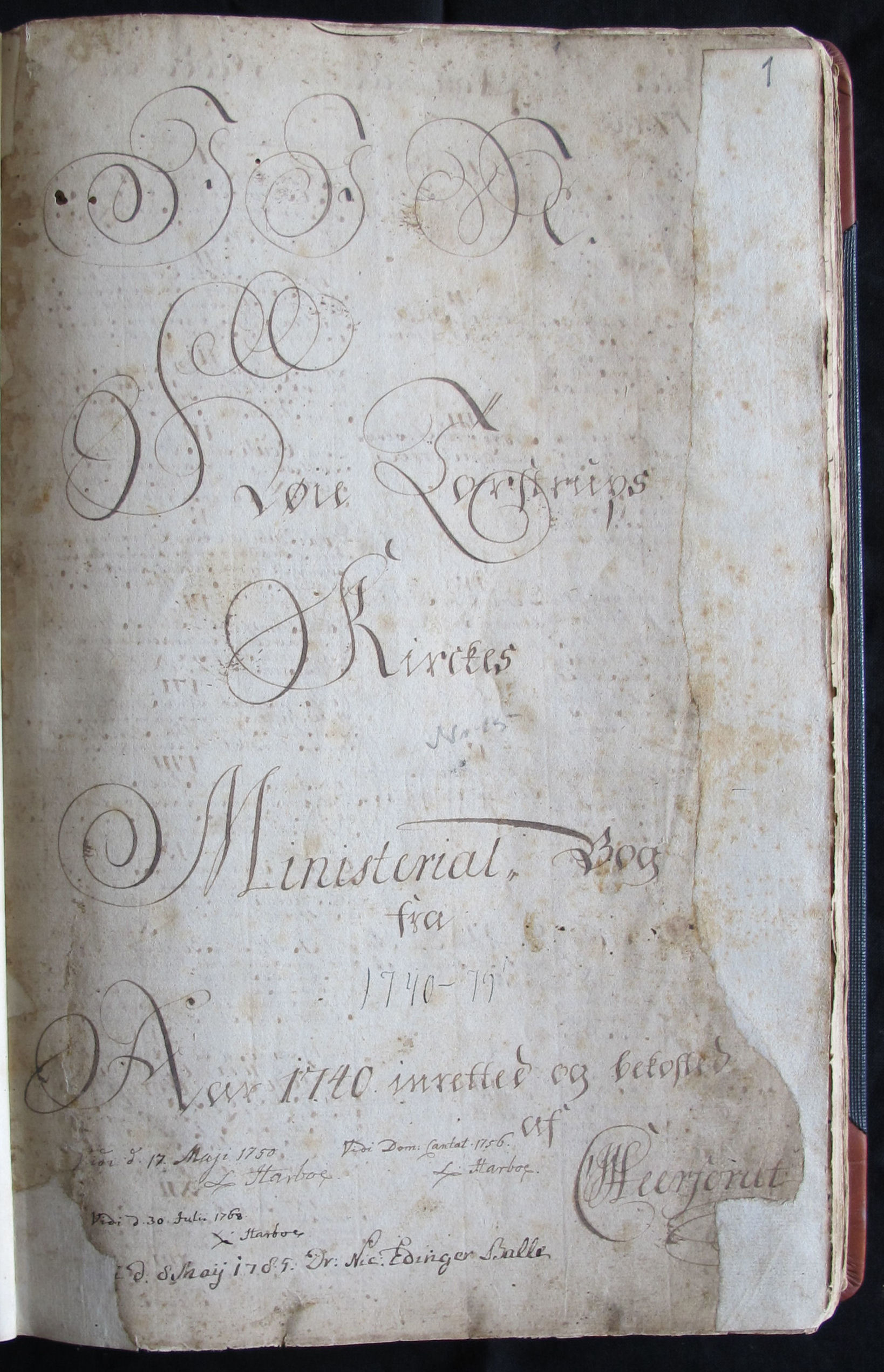 Kirkebog for Høje Taastrup Sogn, 1740-1779, med Ludvig Harboes og Nicolai Edinger Balles underskrifter.